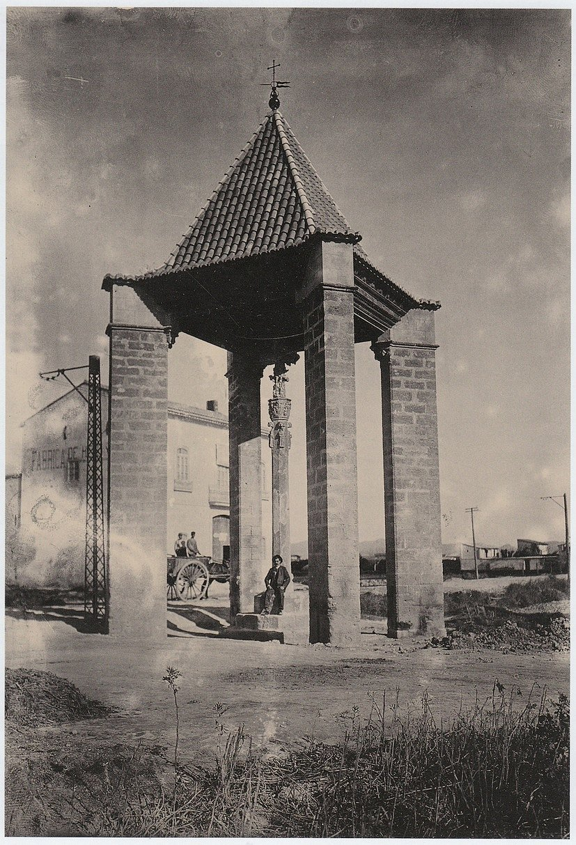 Creu coberta d'Almàssera vista des del sud. L'edifici del fons continua existint al peu de la carretera de Barcelona.